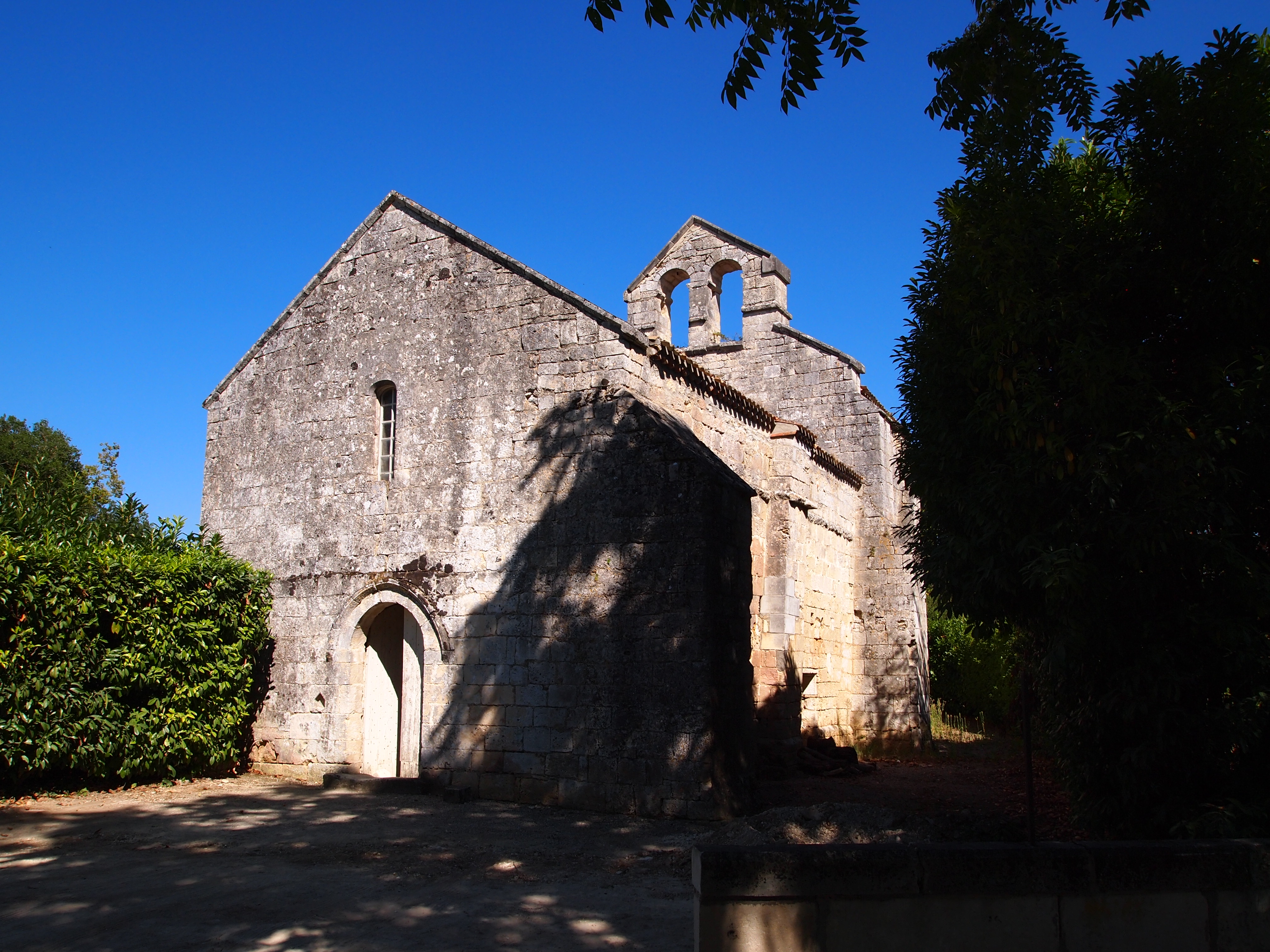 Église de Saint-Surin, Châteauneuf-sur-Charente (Charente, France), du IX° s (inscrit, 1925)